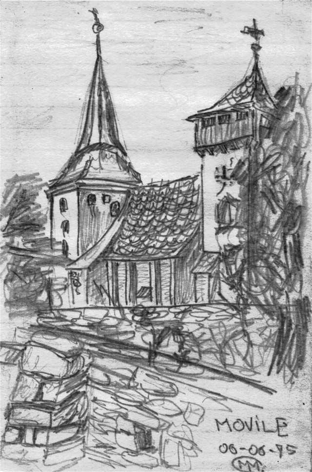 Desen făcut de mine în 1975 cu biserica din Movile. Miehs Cristian-Mihail